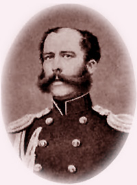 Столыпин Аркадий Дмитриевич